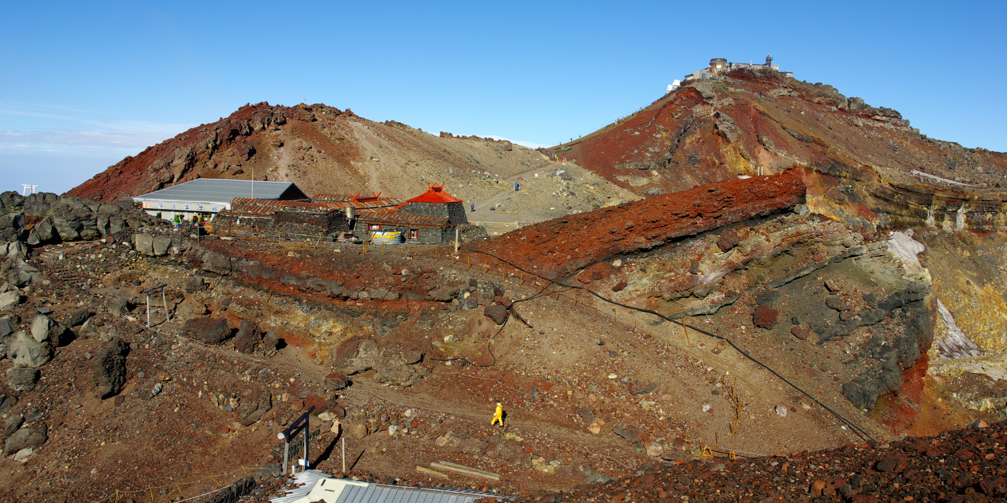 富士山浅間大社奥宮と三島岳と剣ヶ峯